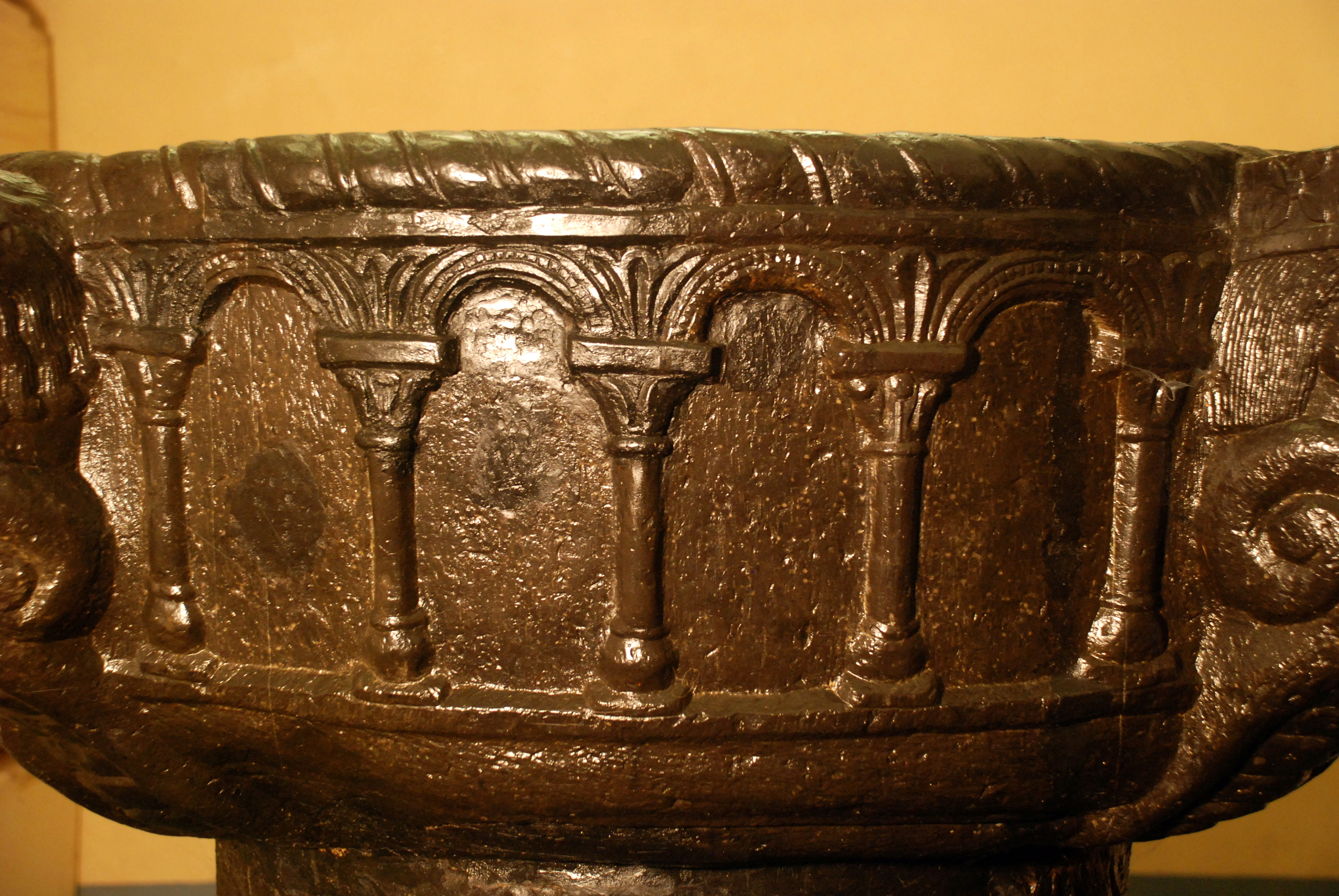 Belgique - Wallonie - Fonts baptismaux de Beauvechain